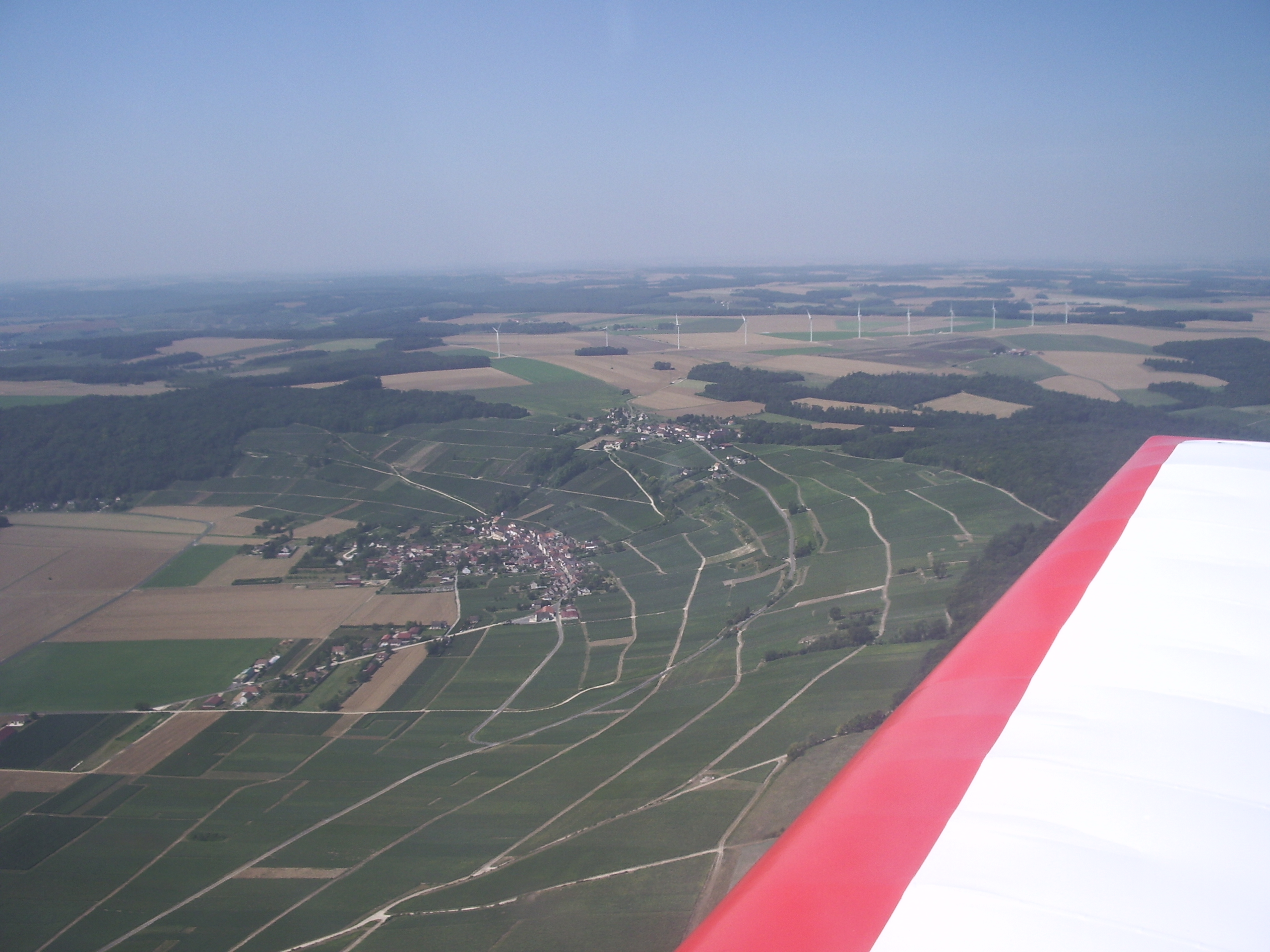 Vue aérienne de Bonneil, des vignes de Champagne sur les coteaux des bords de Marne, et du parc éolien de Charly-sur-Marne